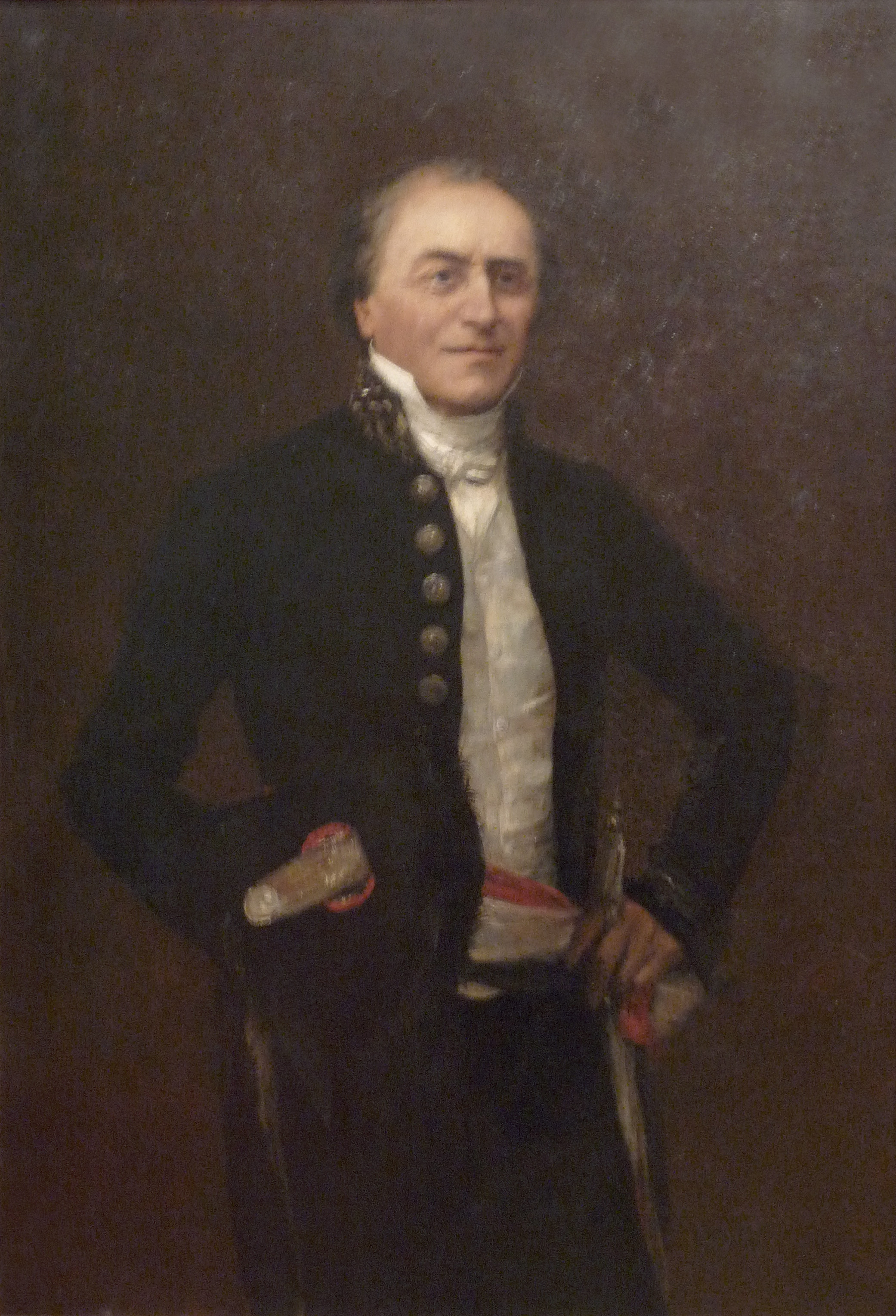 Jules Bastien-Lepage, Portrait de Paulin Gillon. 1880. Musée barrois